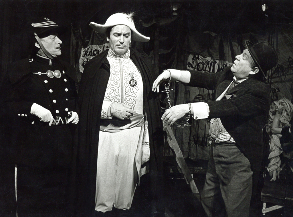 Bertolt Brecht, Kurt Weill, Opera za tri groše, Drama SNG v Ljubljani. Na fotografiji: Bert Sotlar (Brown), Maks Furijan (Smith), Stane Sever (Jonatan Jeremija Peachum)